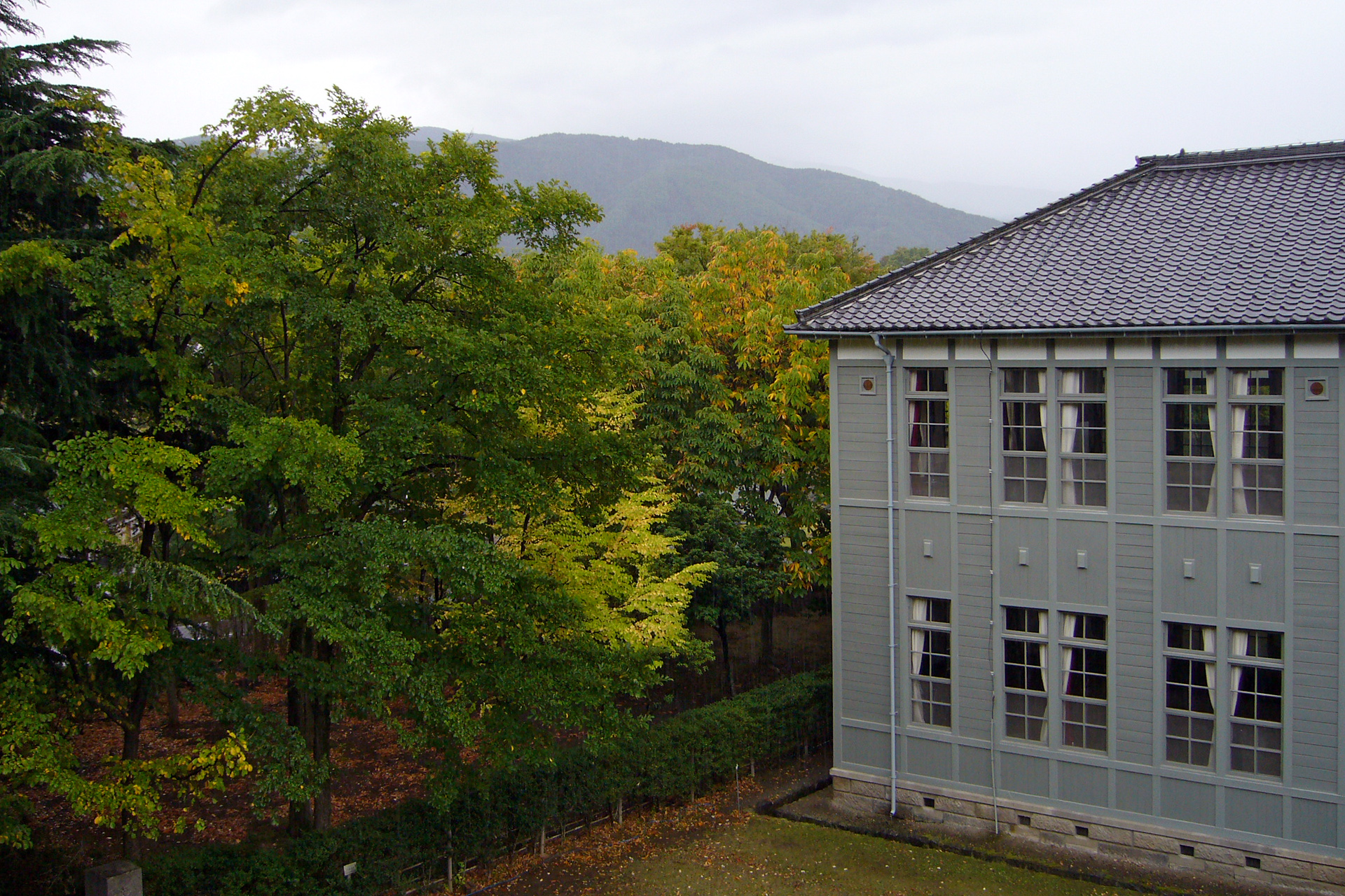 Agata-no-mori park in Matsumoto, Japan